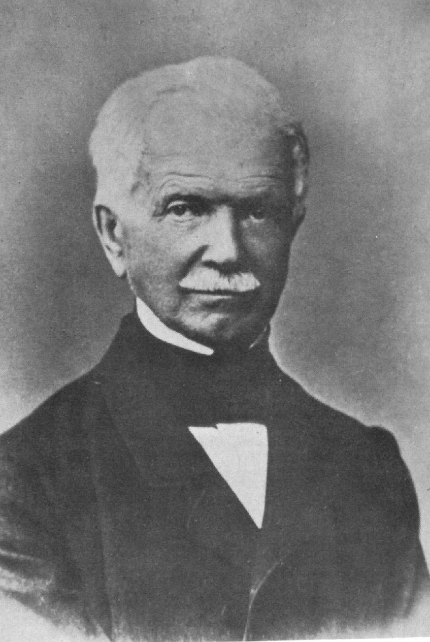 Beschreibung: Wilhelm August von Plessen Datum: um 1870 Quelle: Buch "Die Plessen", C.A. Starke Verlag, Limburg, 1971 Urheber: unbekannter Photograph